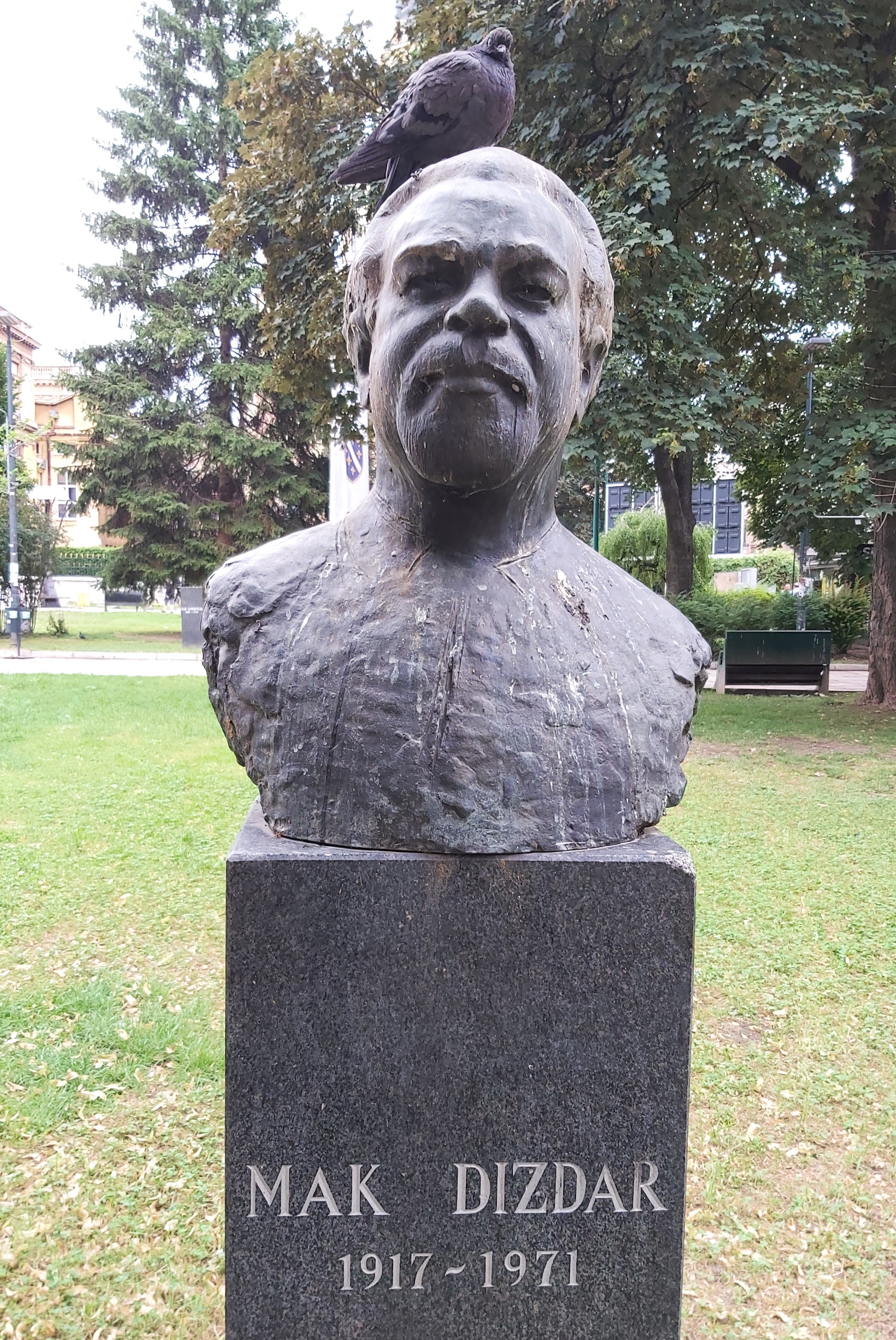 Mak Dizdar, bista, Trg Oslobođenja - Alija Izetbegović, Sarajevo